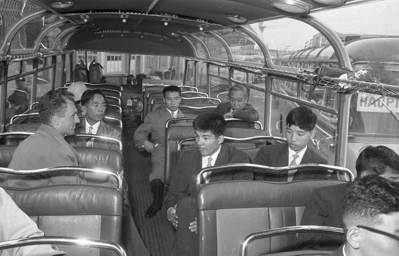 Besuch japanischer Schüler in der Bundesrepublik Ankunft am Flughafen Wahn